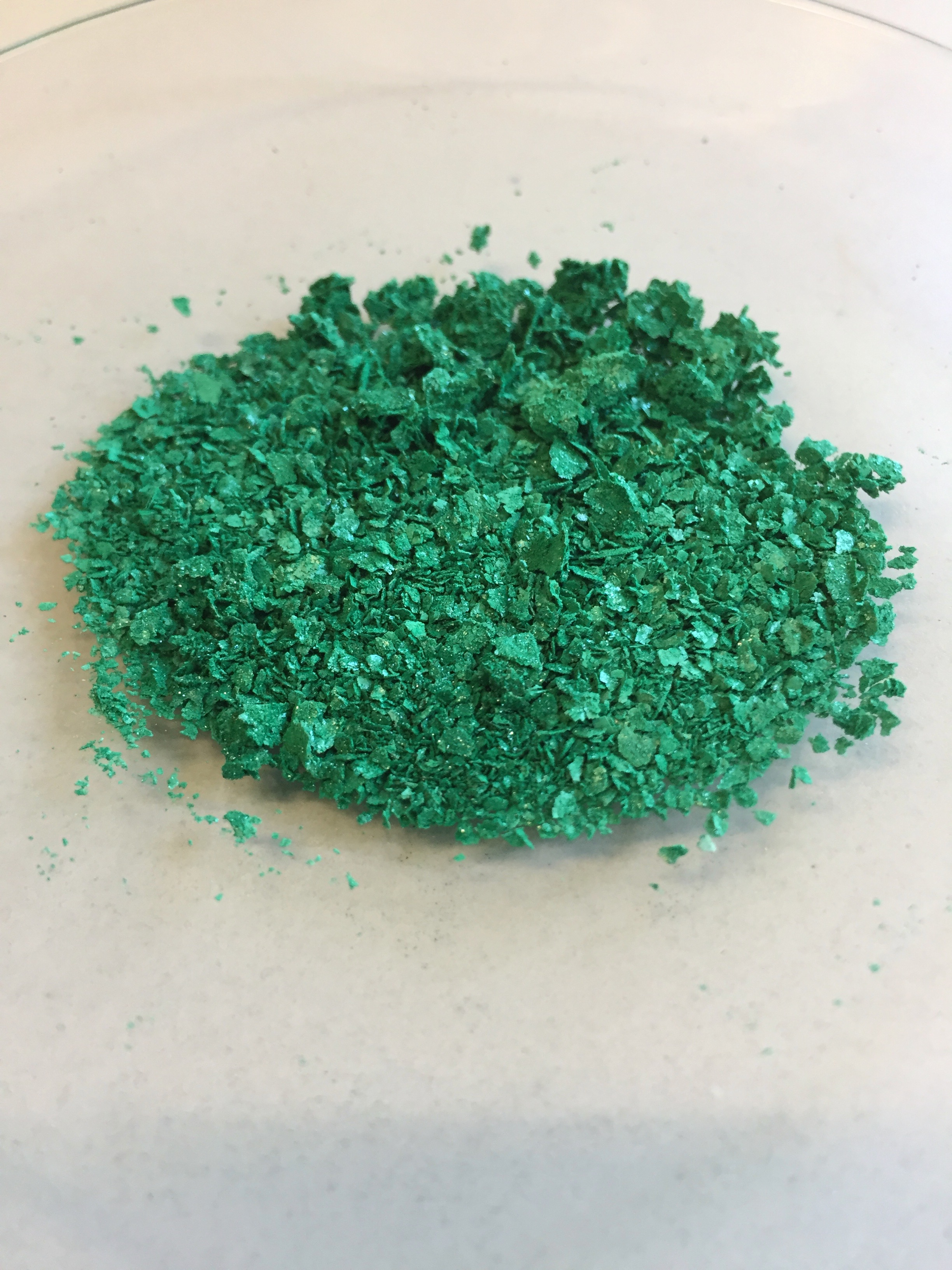 Trans-dichlorobis(ethylendiamine)cobalt(III) chloride